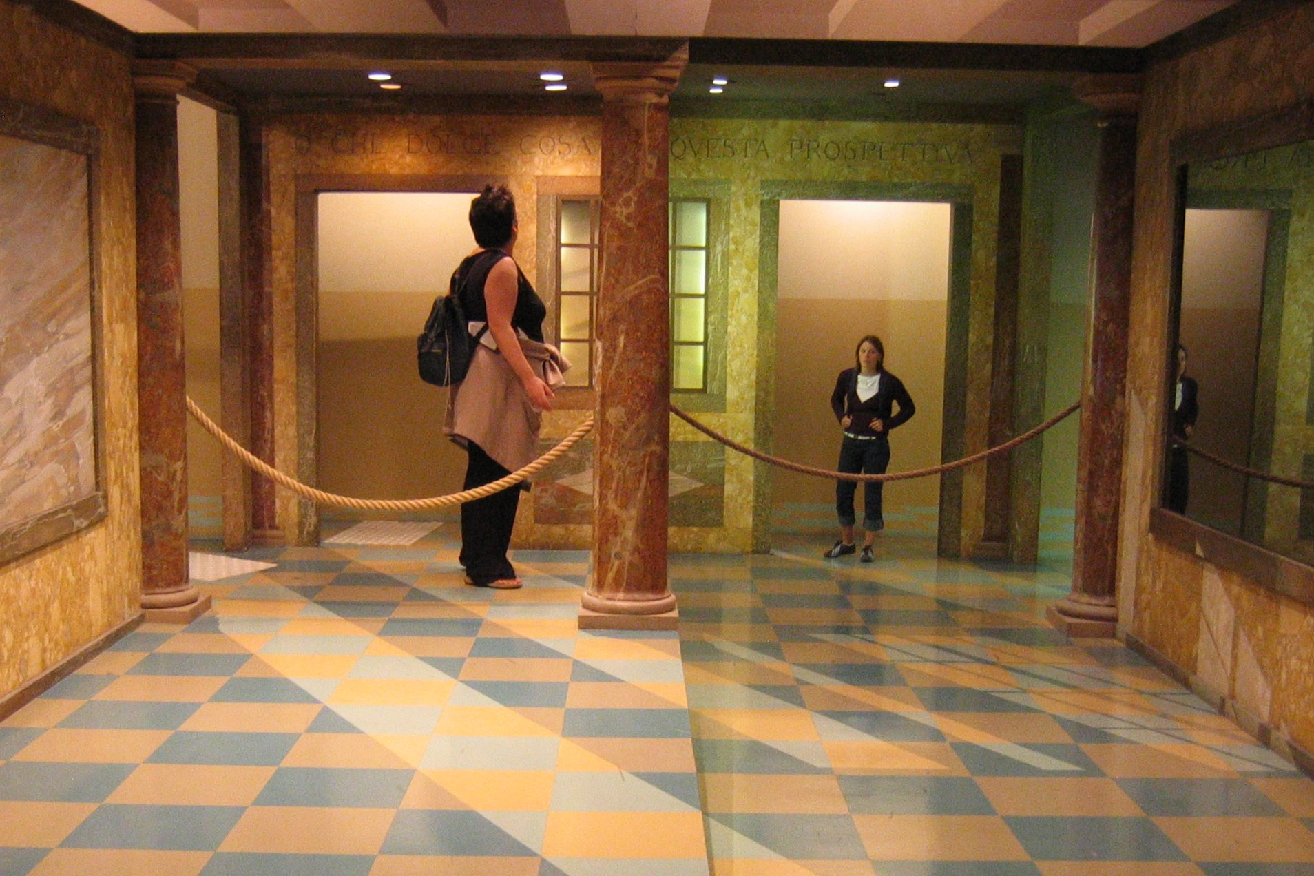 "Ames room" in Vilette science museum